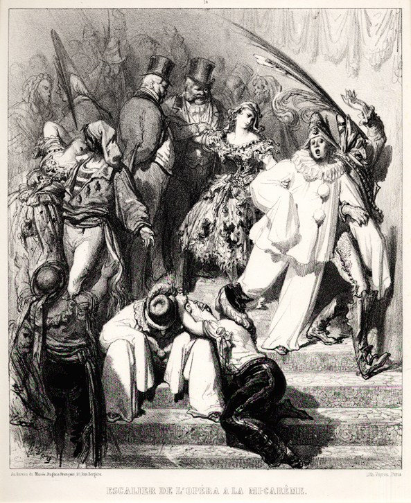 L'escalier de l'Opéra de Paris au moment de la fête de la Mi-Carême. Estampe extraite de la suite de 2à planches pour le Musée Anglais-Français, format 320 x 257 mm.